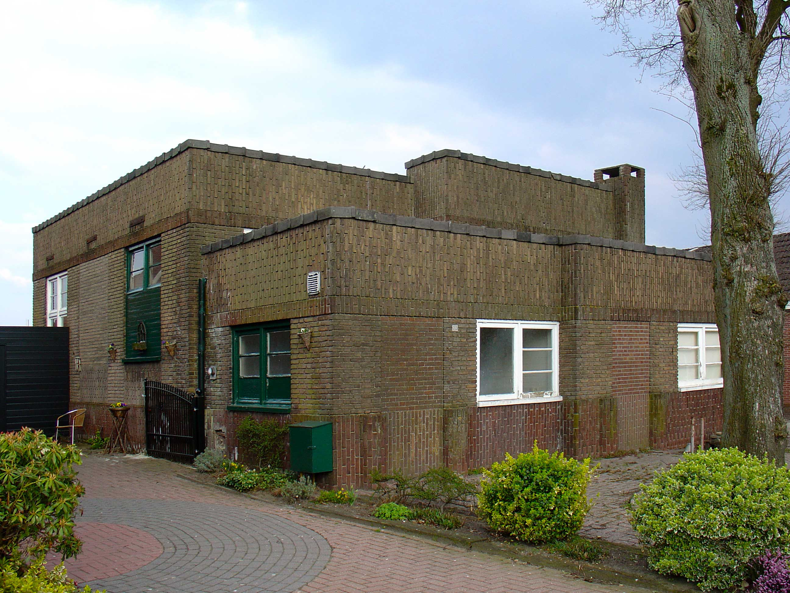 Voormalig slachthuis, rijksmonument Stadskanaal